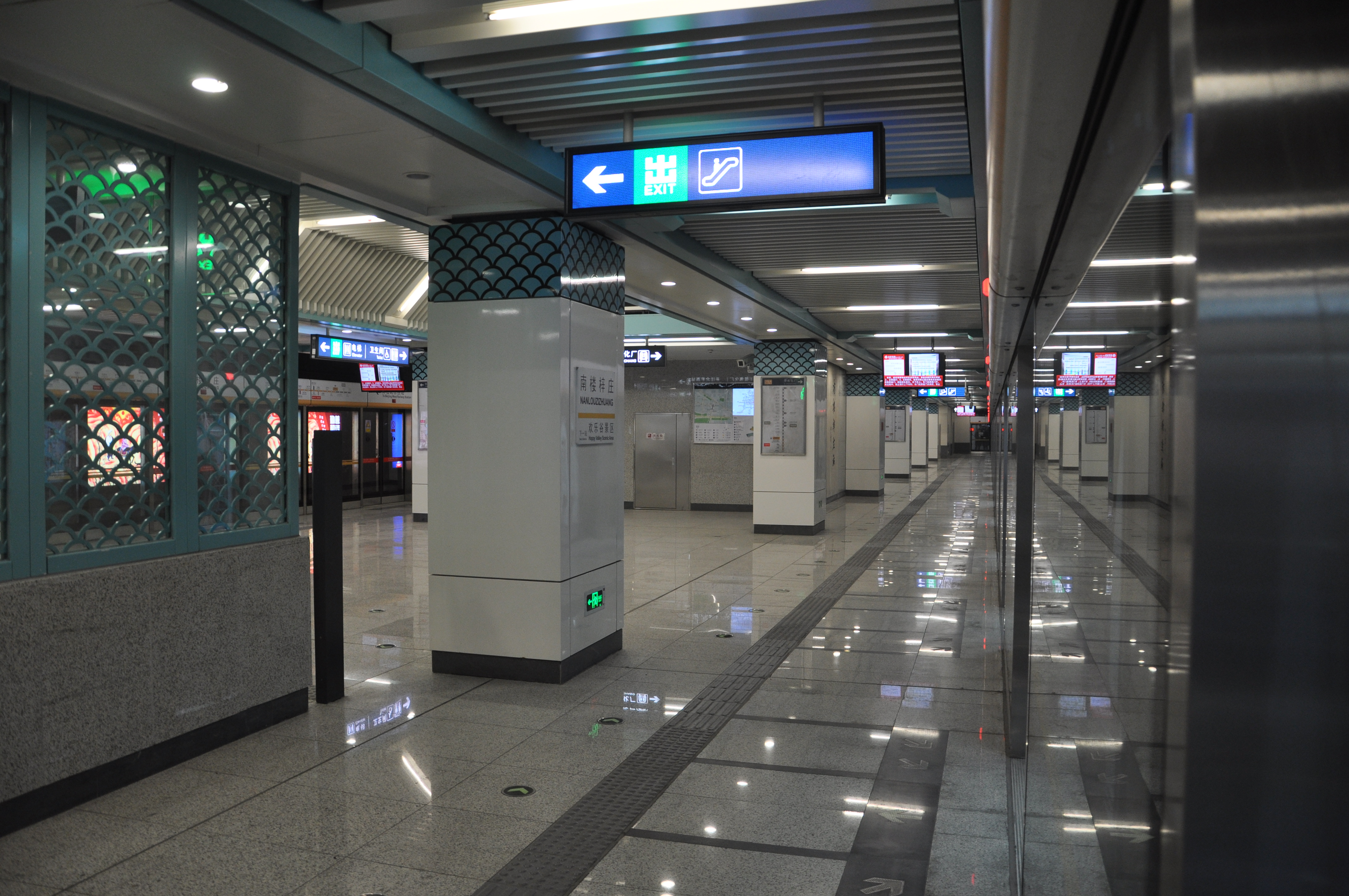 北京地铁7号线南楼梓庄站站台。